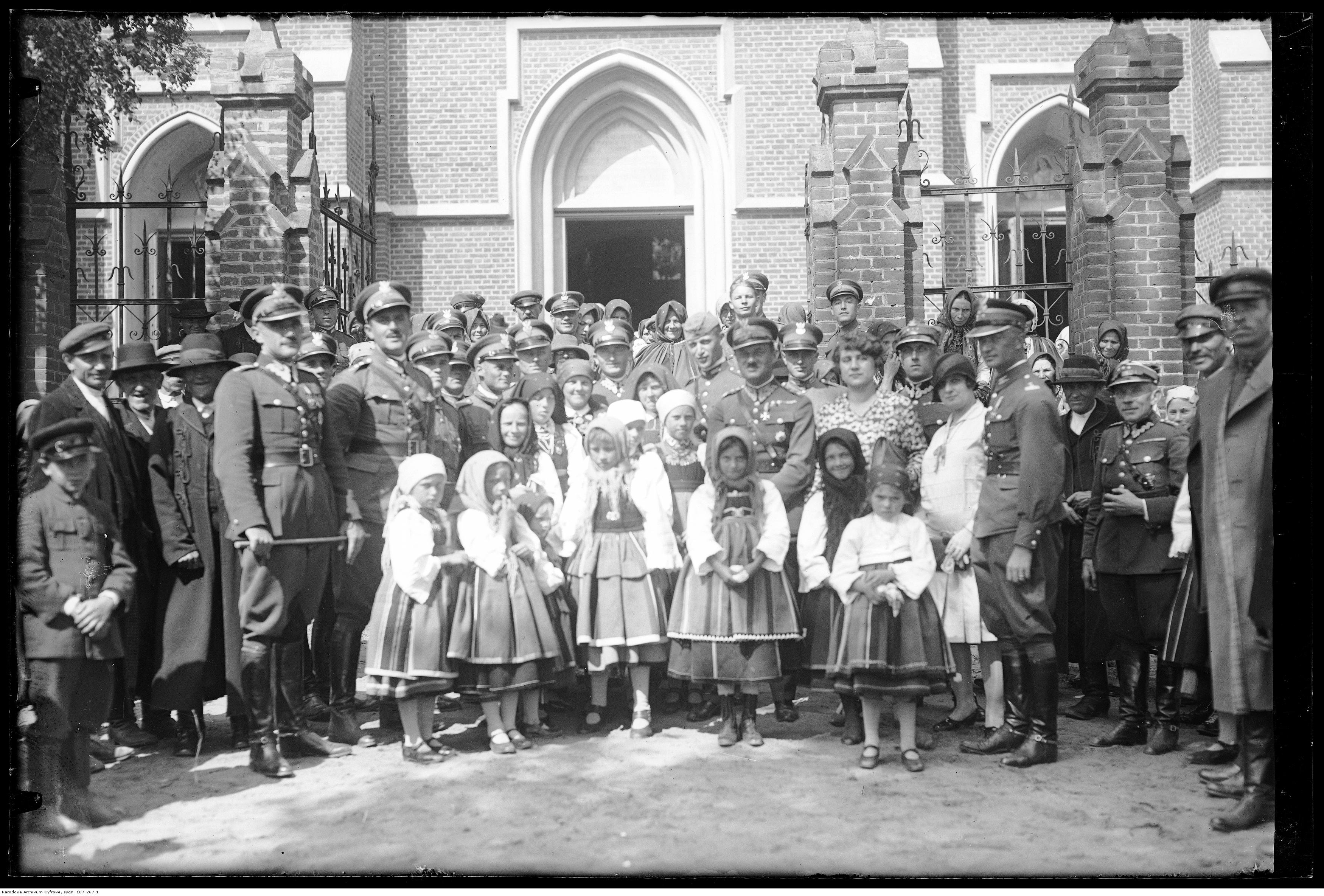 Oficerowie i podoficerowie Pułku oraz Księżacy Łowiccy przed kościołem w Kompinie. Widoczni m.in.: mjr Józef Szostak (z prawej strony dziewczynek), ppłk Jan Karcz (za dziewczynkami z prawej).